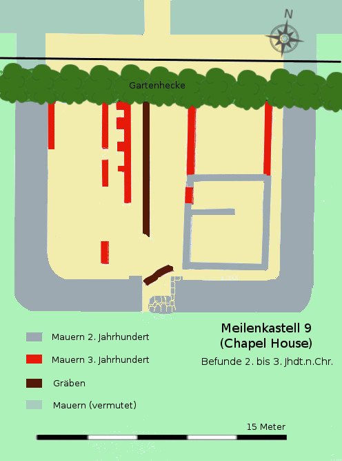 Befundplan des Meilenkastell 9 (Chapel House), Hadrianswall (GB), 2. bis 3. Jahrhundert.